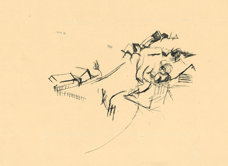 Feder in Schwarz, auf bräunlichem dünnem Velin. 25:40,7 cm. Skizzenbuchblatt.